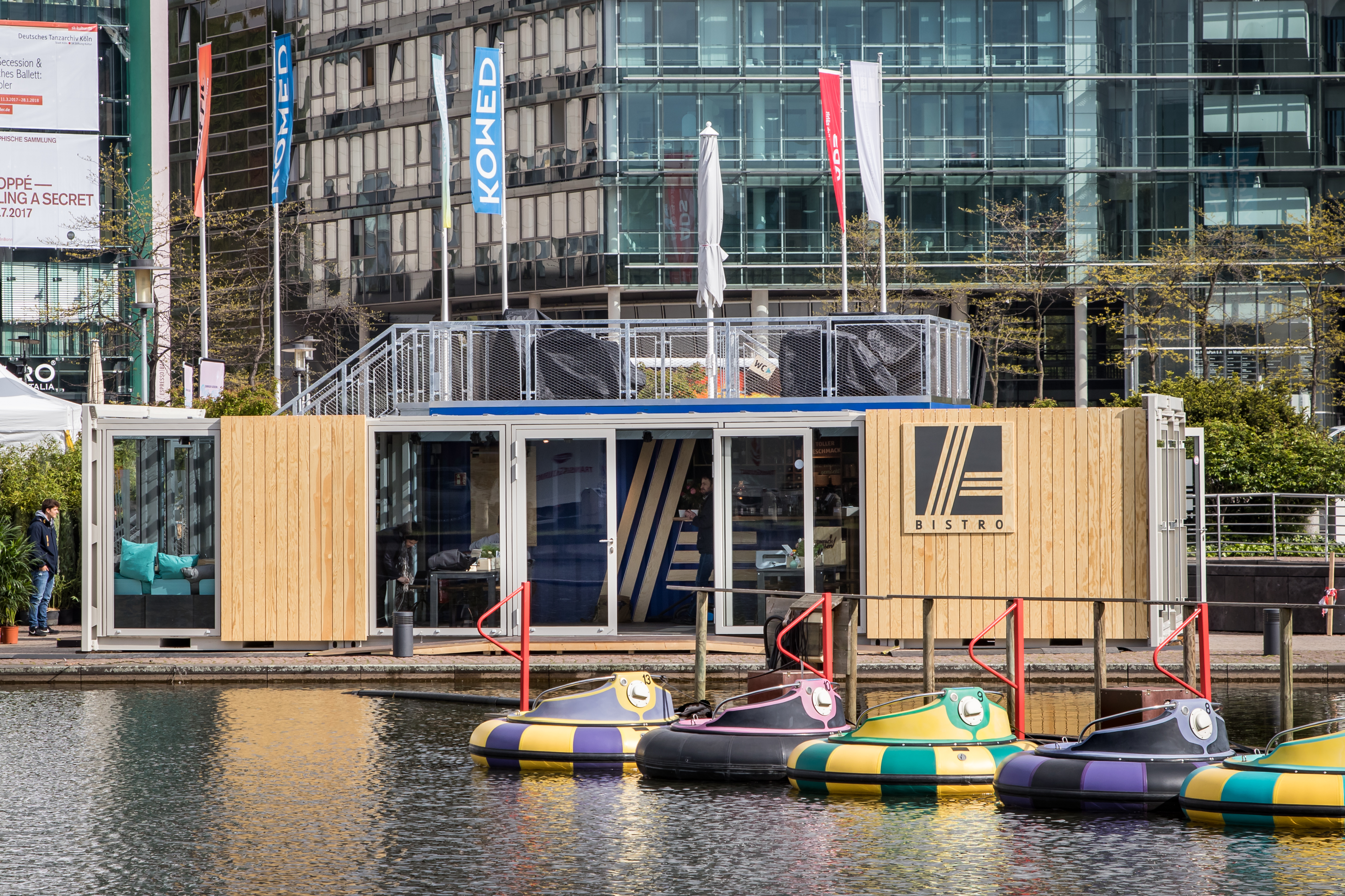 Aldi-Bistro im Kölner MediaPark, einen Tag vor Eröffnung